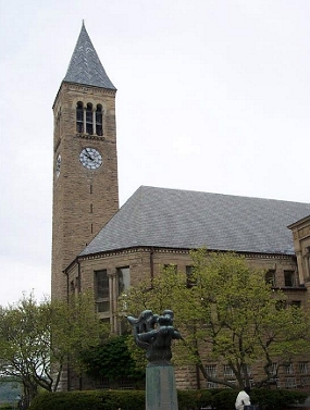 康乃爾大學尤里斯圖書館旁的鐘樓 拍攝日期：2002年5月16日 相機型號：Kodak LS420 數碼相機 攝影者：Ivytsoi